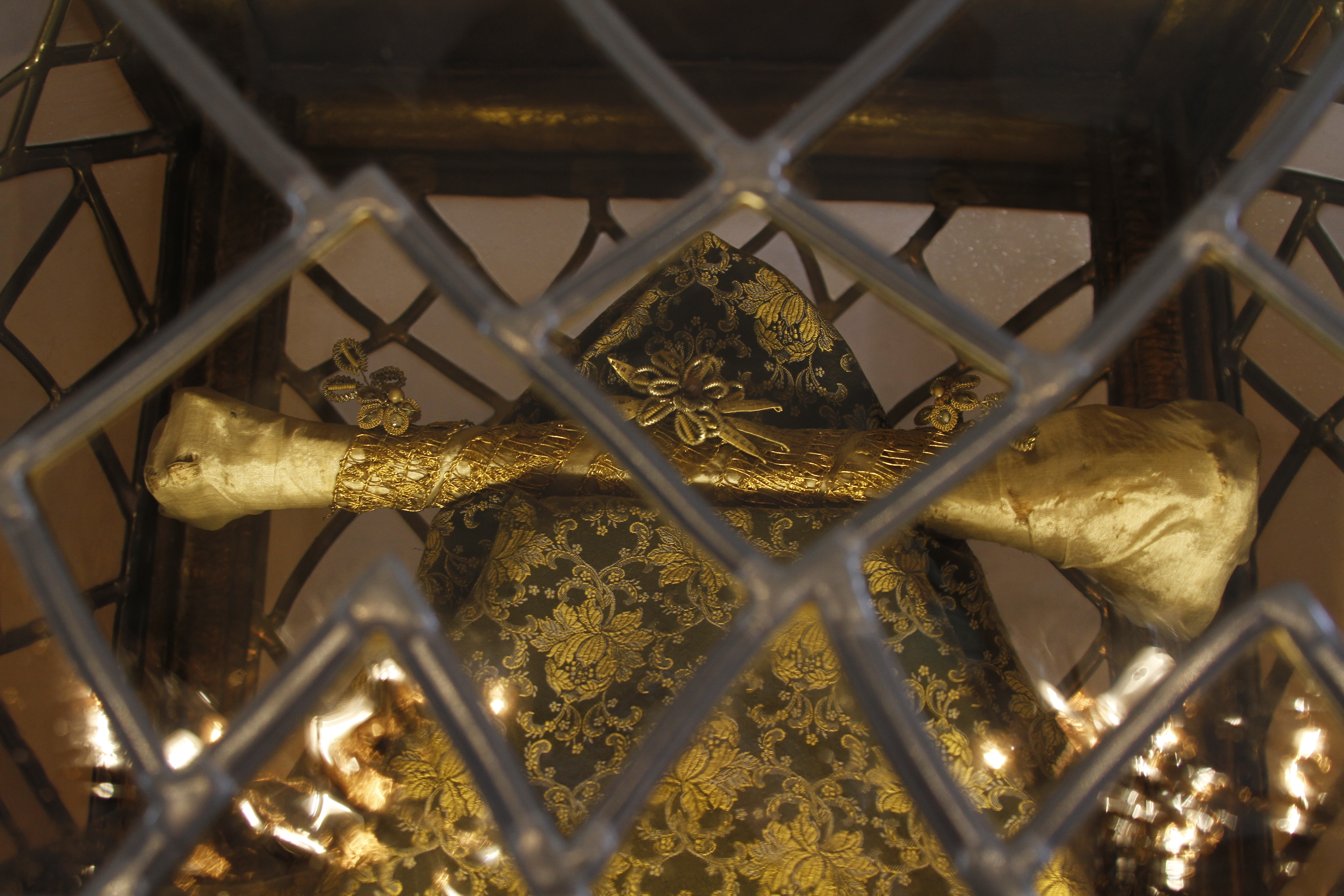 Speyer Cathedral - Speyer - Germany